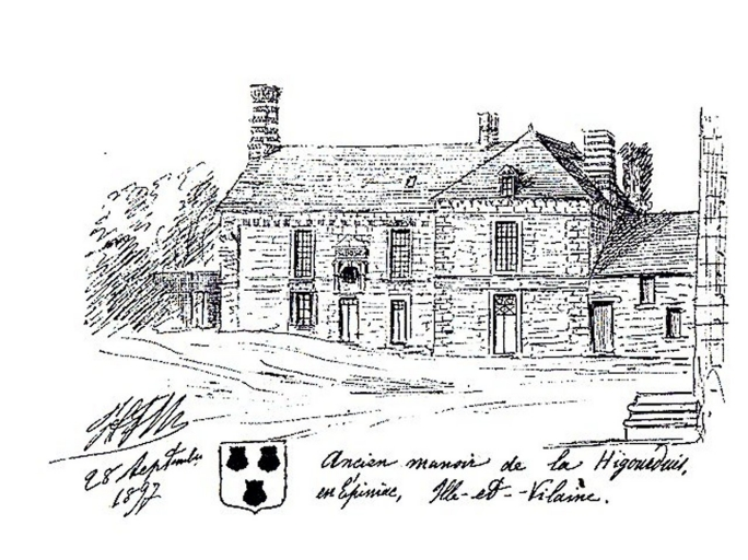 Vue générale de la façade antérieure du manoir de la Higourdais. Signature 1897 et publié en 1907.